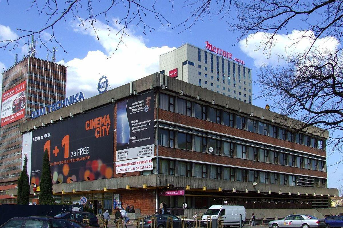 Dom Technika, widziany od strony kanału Radunii.